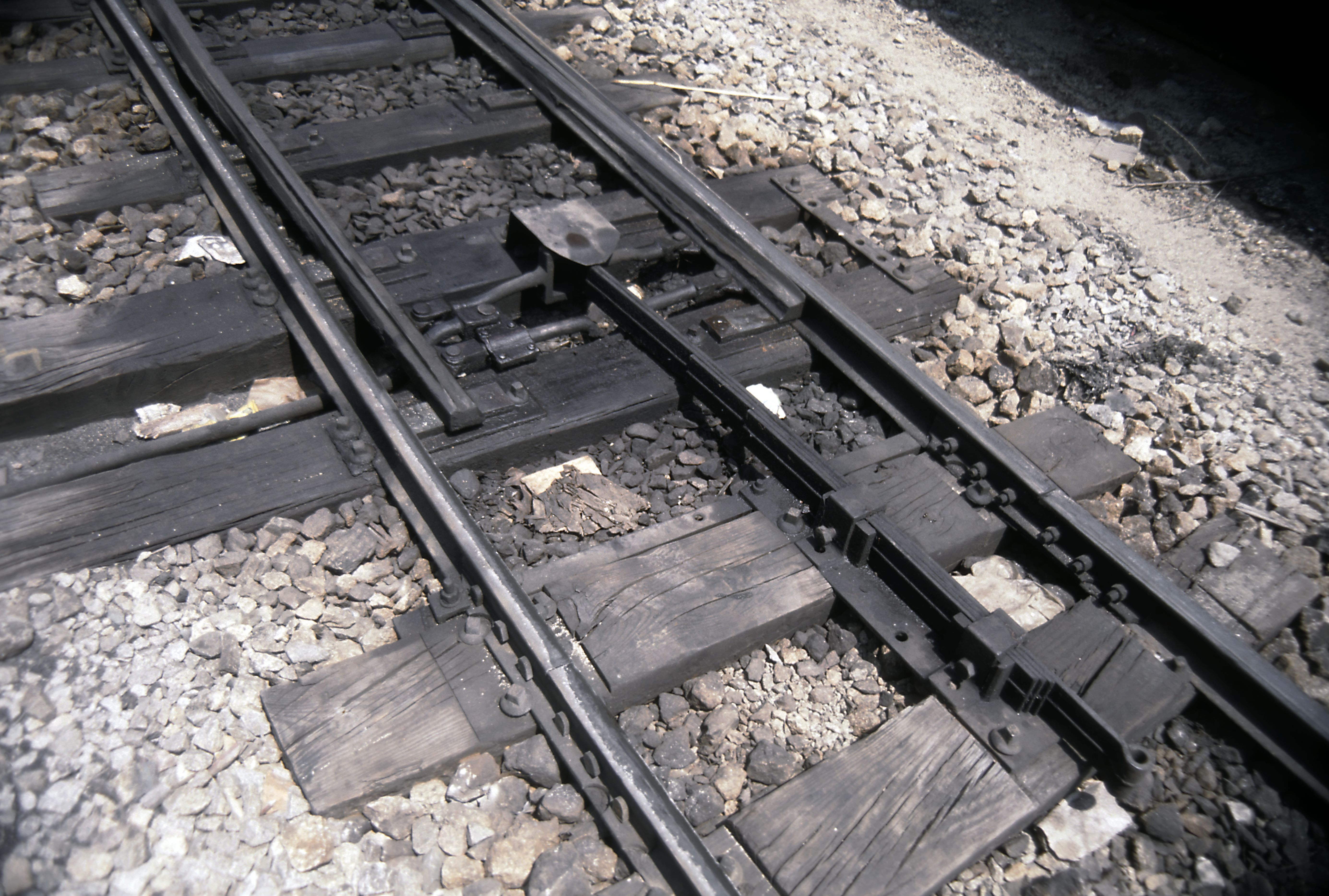 Rückfallweiche mit Rückstellvorrichtung in Form einer Lkw-Tragfeder